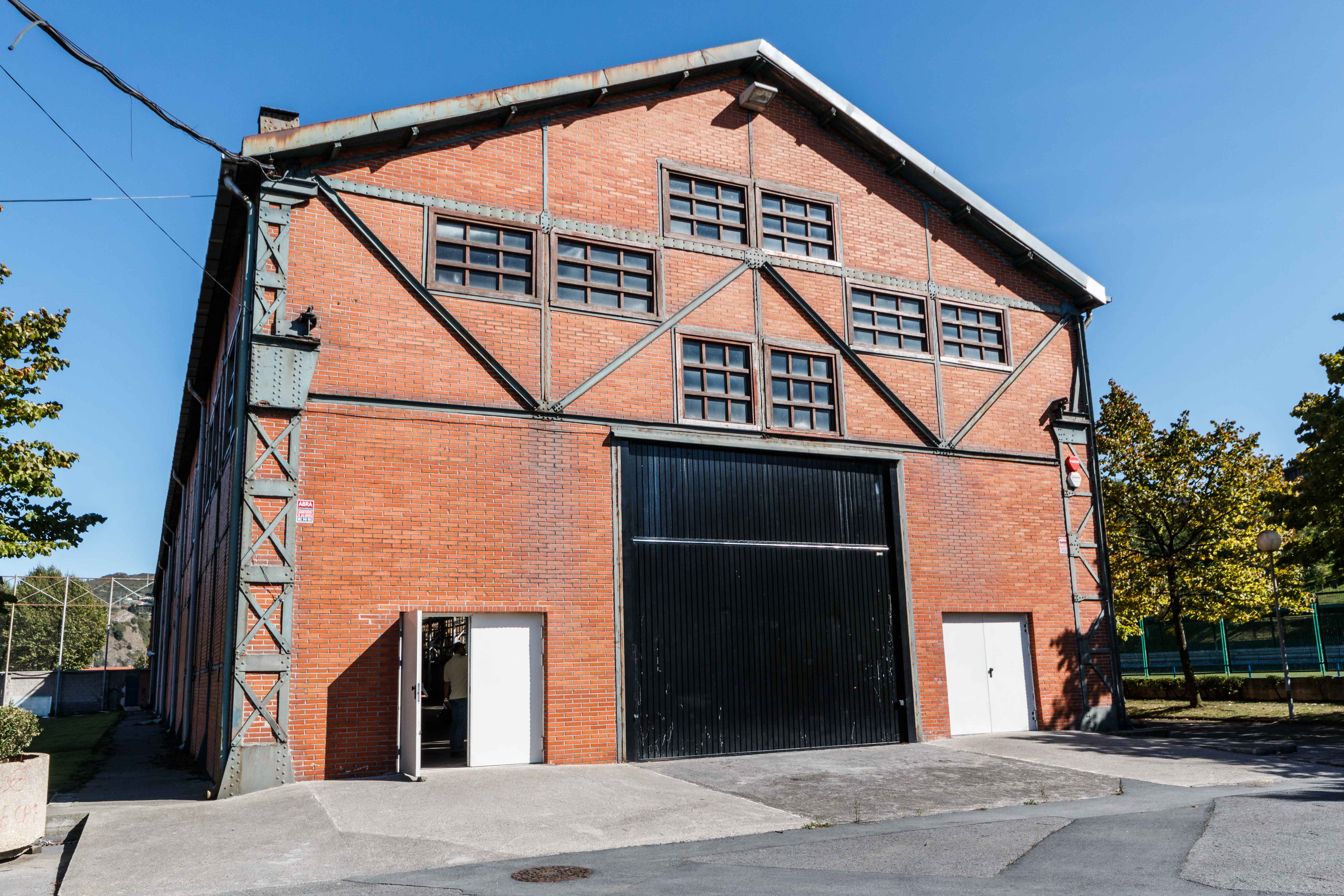 Teknikaren Museoa